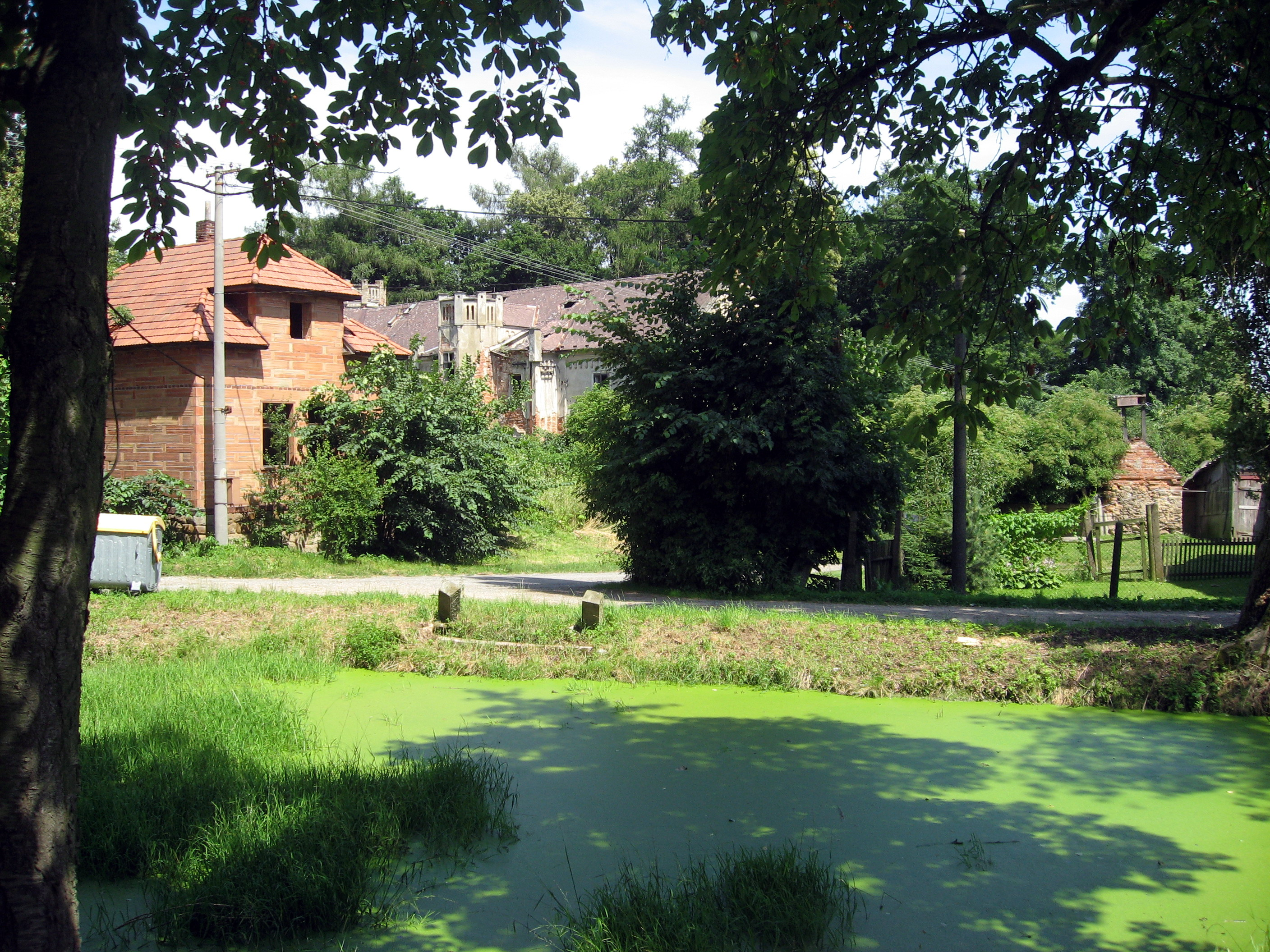 Kvasetice